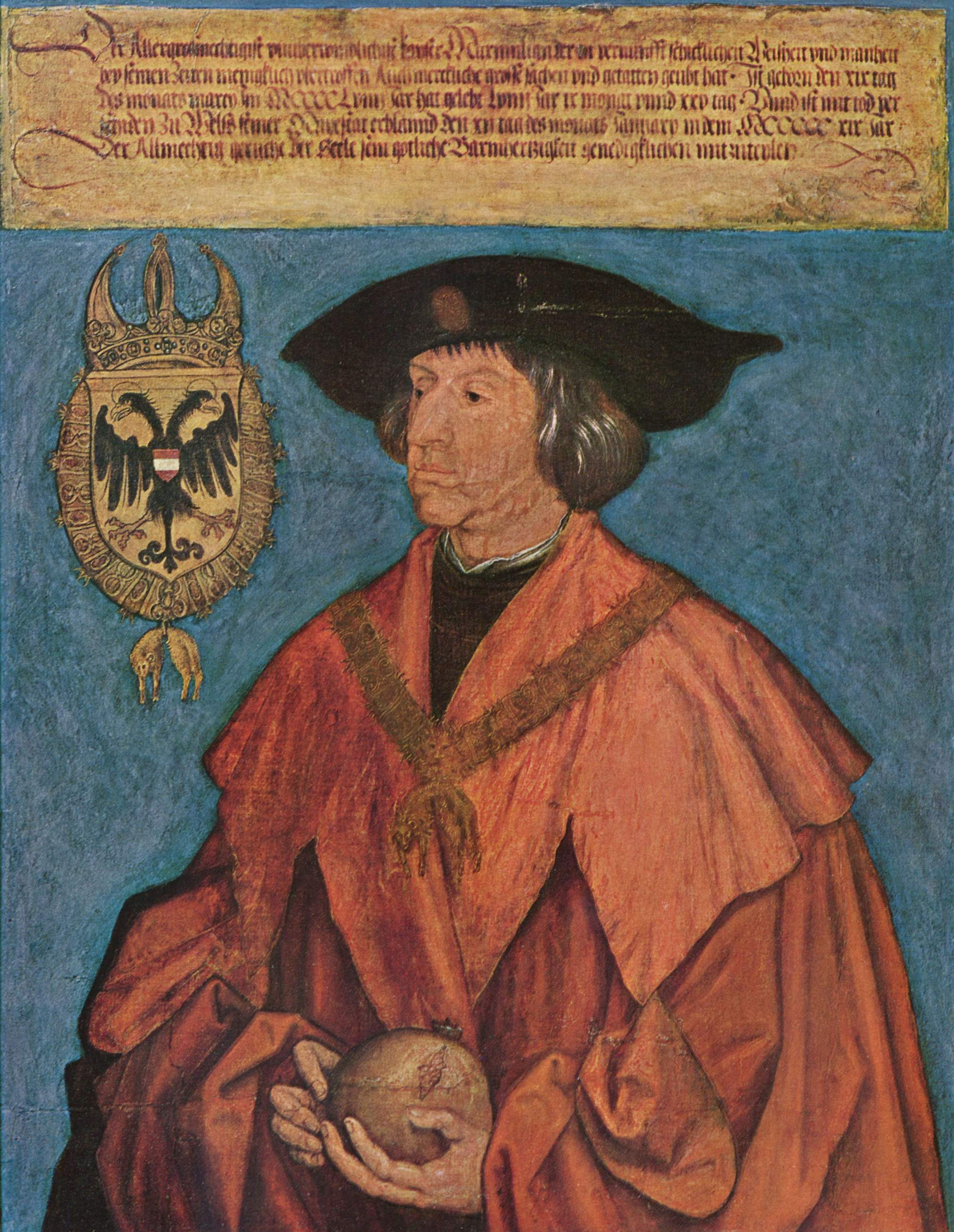 Brustbild nach links vor blauem, ursprünglich grünem Grund. Kaiser Maximilian I trägt über dem hochgeschlossenen dunklen Wams eine rote Seidenschaube mit breitem Schulterkragen, auf dem Kopf trägt er ein schwarzes Barett mit einer Medaille auf der in in halber Figur Maria mit dem Kind abgebildet ist. In den Händen hält er einen Granatapfel. Links Wappen und Kollane des Ordens vom Goldenen Vlies. - Links Wappen: Doppeladler mit Habsburger Bindenschild, umrahmt von der Kollane des Ordens vom Goldenen Vlies, gekrönt von der Kaiserkrone.